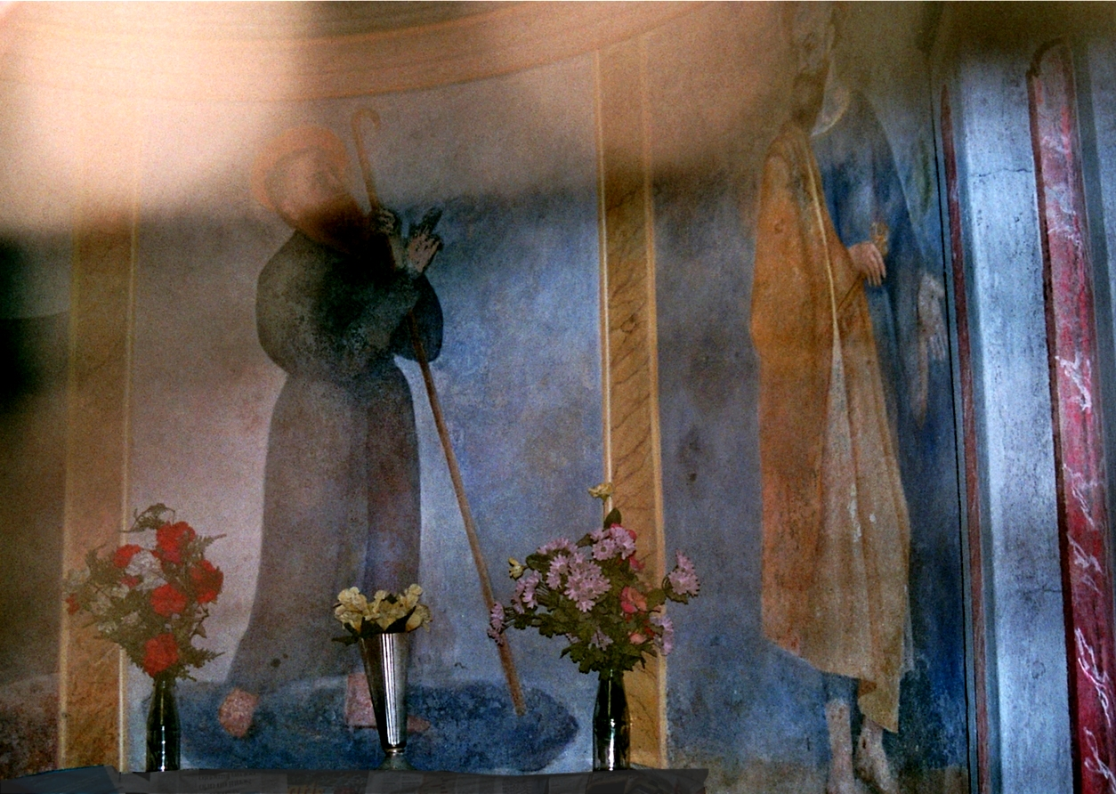 Fara Novarese (NO), Oratorio di San Giulio, decorazione dell'interno.